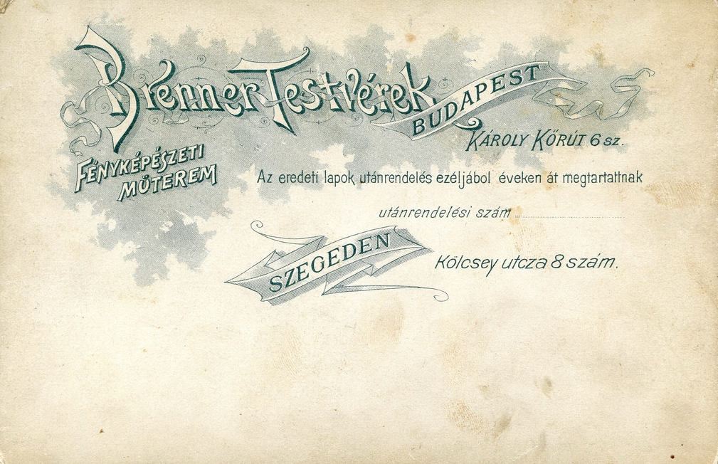 Budapest, Károly körút 6., Szeged, Kölcsey utca 8., a Brenner testvérek fényképészeti műtermei Location: Hungary, Budapest V., Szeged Tags: verso, photographer, studio, Budapest Title: Kölcsey utca 8., Károly körút 6., Brenner testvérek fényképészeti műterme. A felvétel 1898-ban készült.